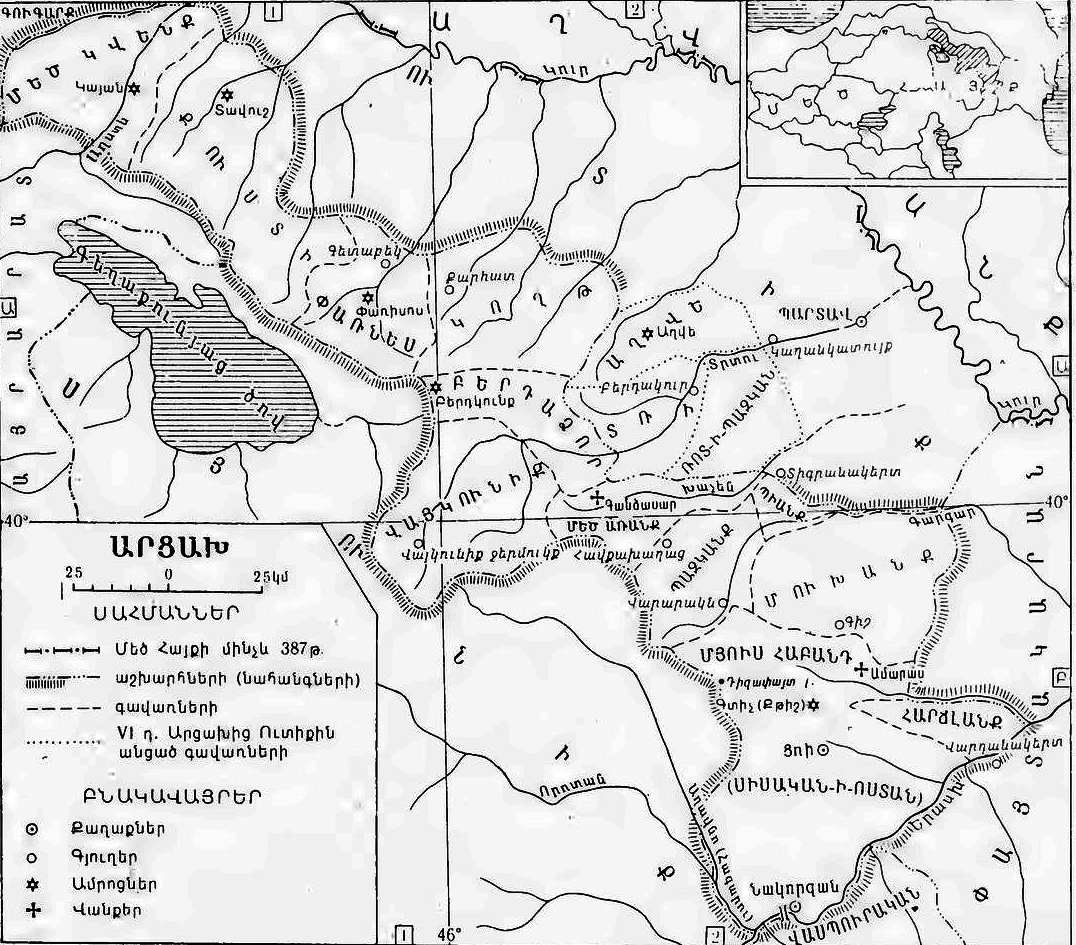 Արցախ